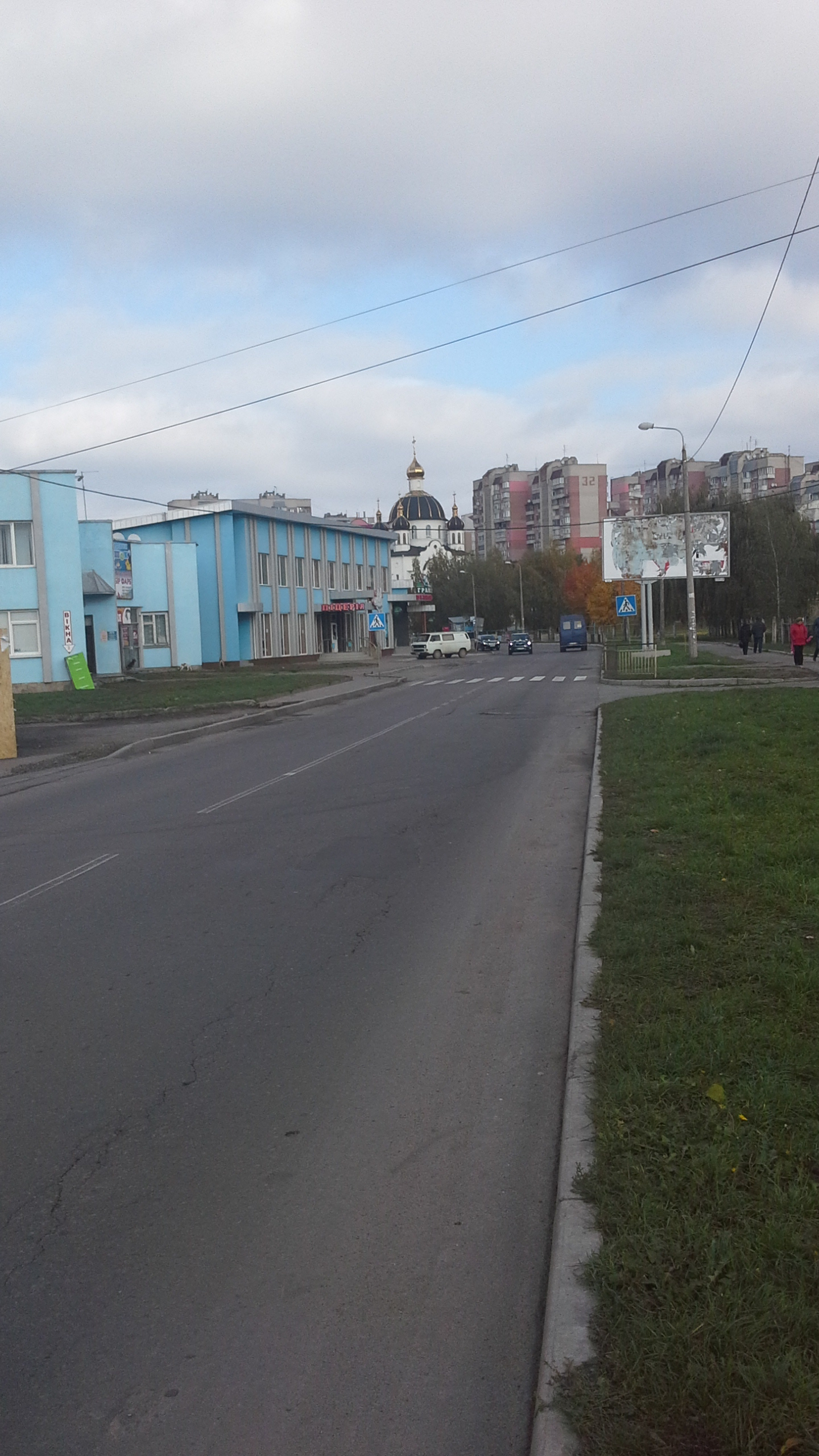 Вулиця Андрія Мельника в Рівному